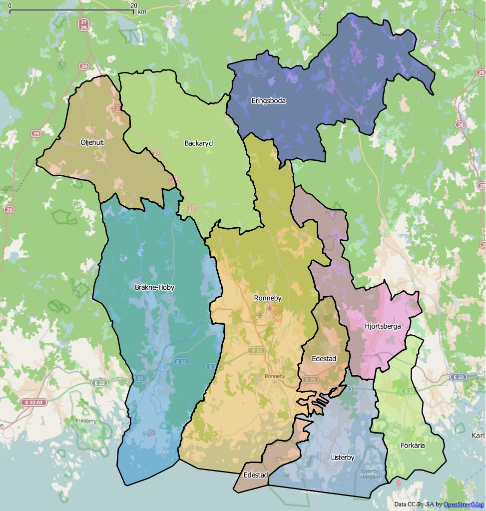 Distriktsindelningen i Ronneby kommun World file: 80.43093202699736821 0 0 -80.43093202699736821 1656277.14157517487183213 7660767.58291774801909924